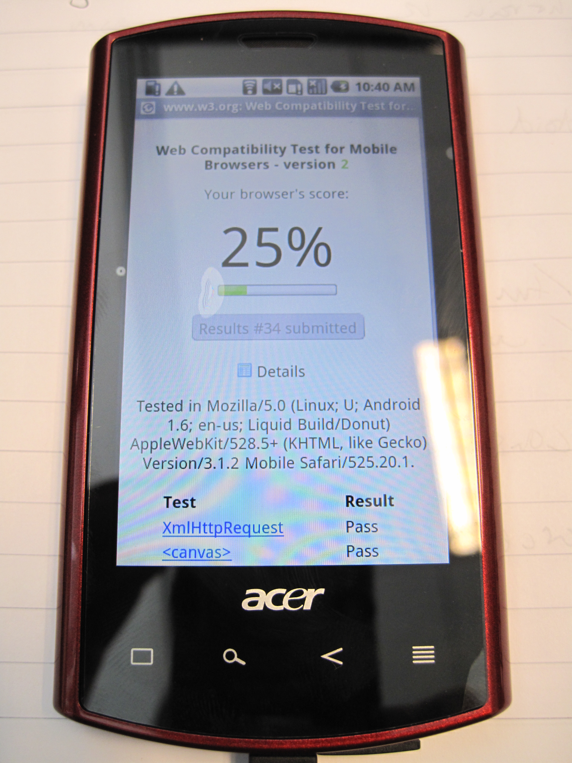 Acer liquid running draft WCTMB2